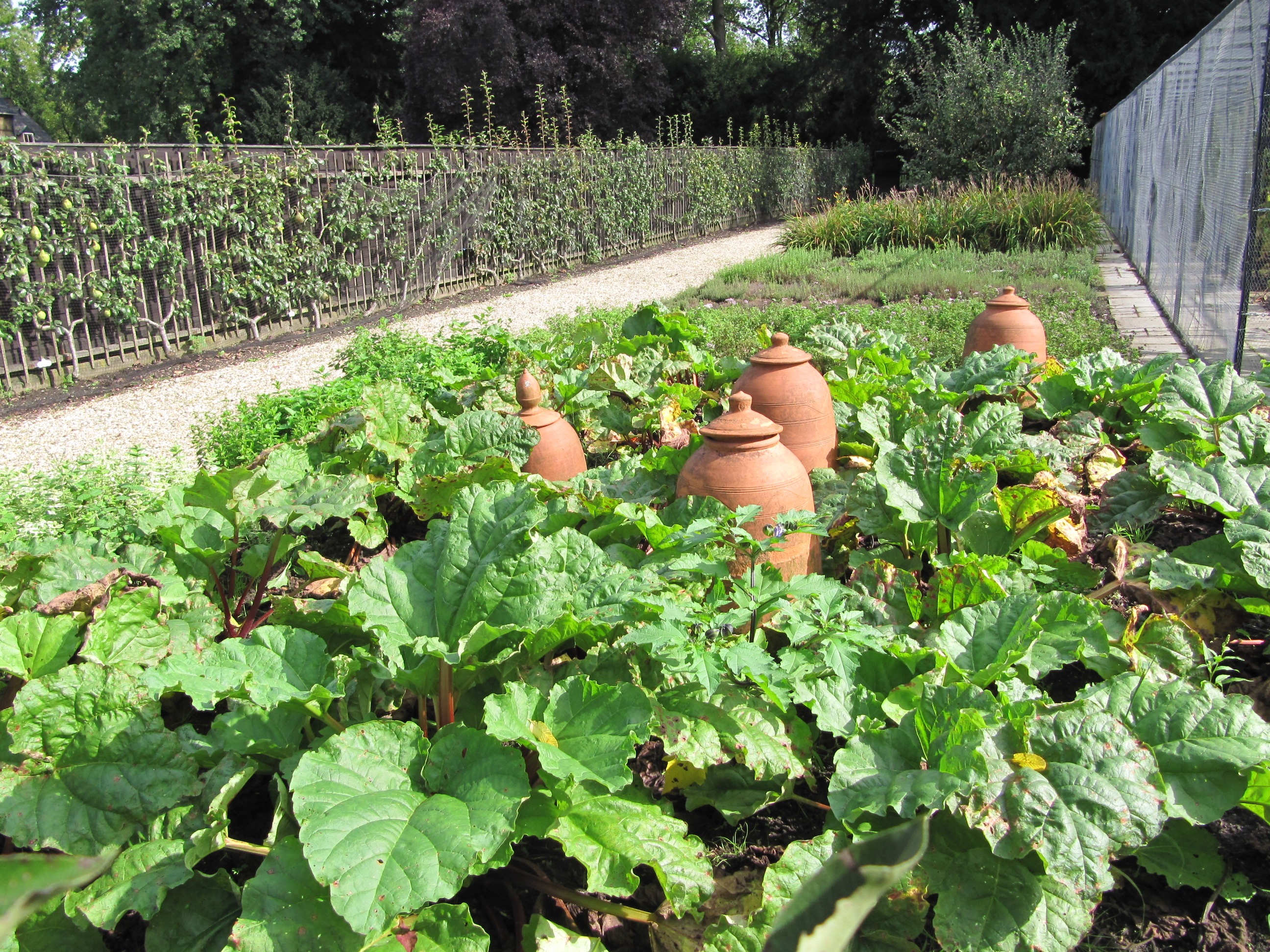 Landgoed Dordwijk, Dordrecht - Forceerpotten voor rabarber. Forceerpotten worden vroeg in het jaar (januari) over een rabarberplant heen gezet, waardoor die denkt dat het voorjaar aangebroken is en gaat groeien. Doordat er geen licht in de pot kan, worden de bladstelen gebleekt en worden ze zacht en mals. Bron